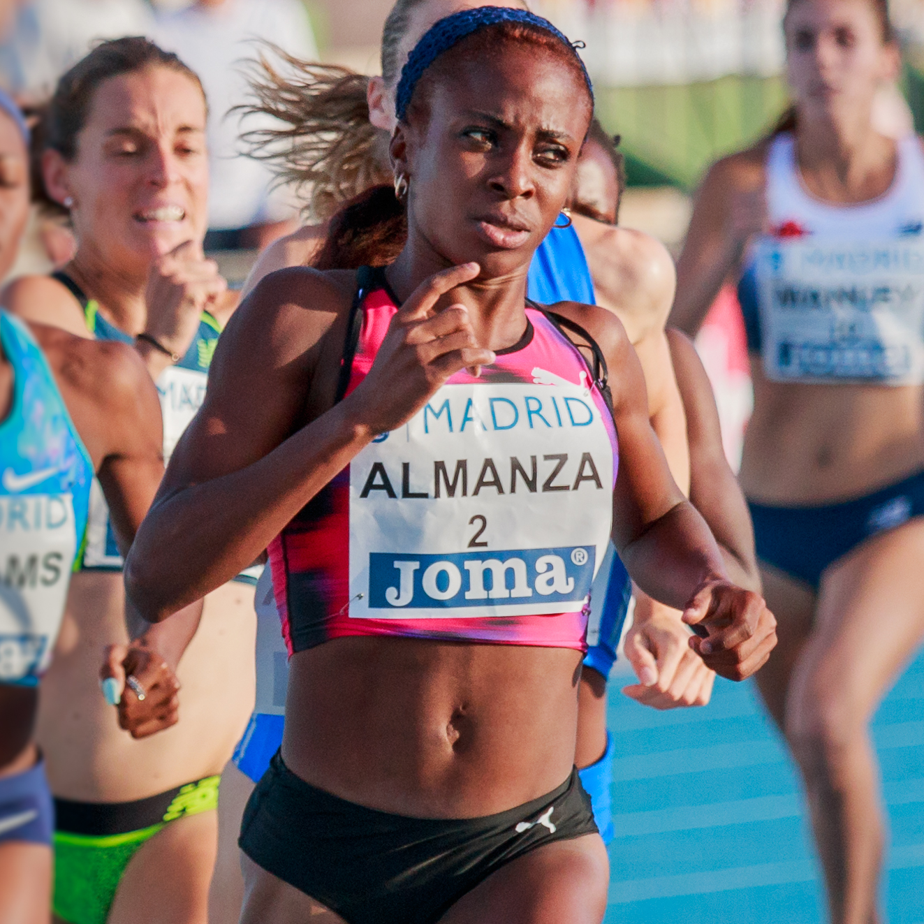 Rosmary Almanza (CUB). 800m. IAAF World Challenge. Meeting Madrid 2017. Moratalaz, Madrid.